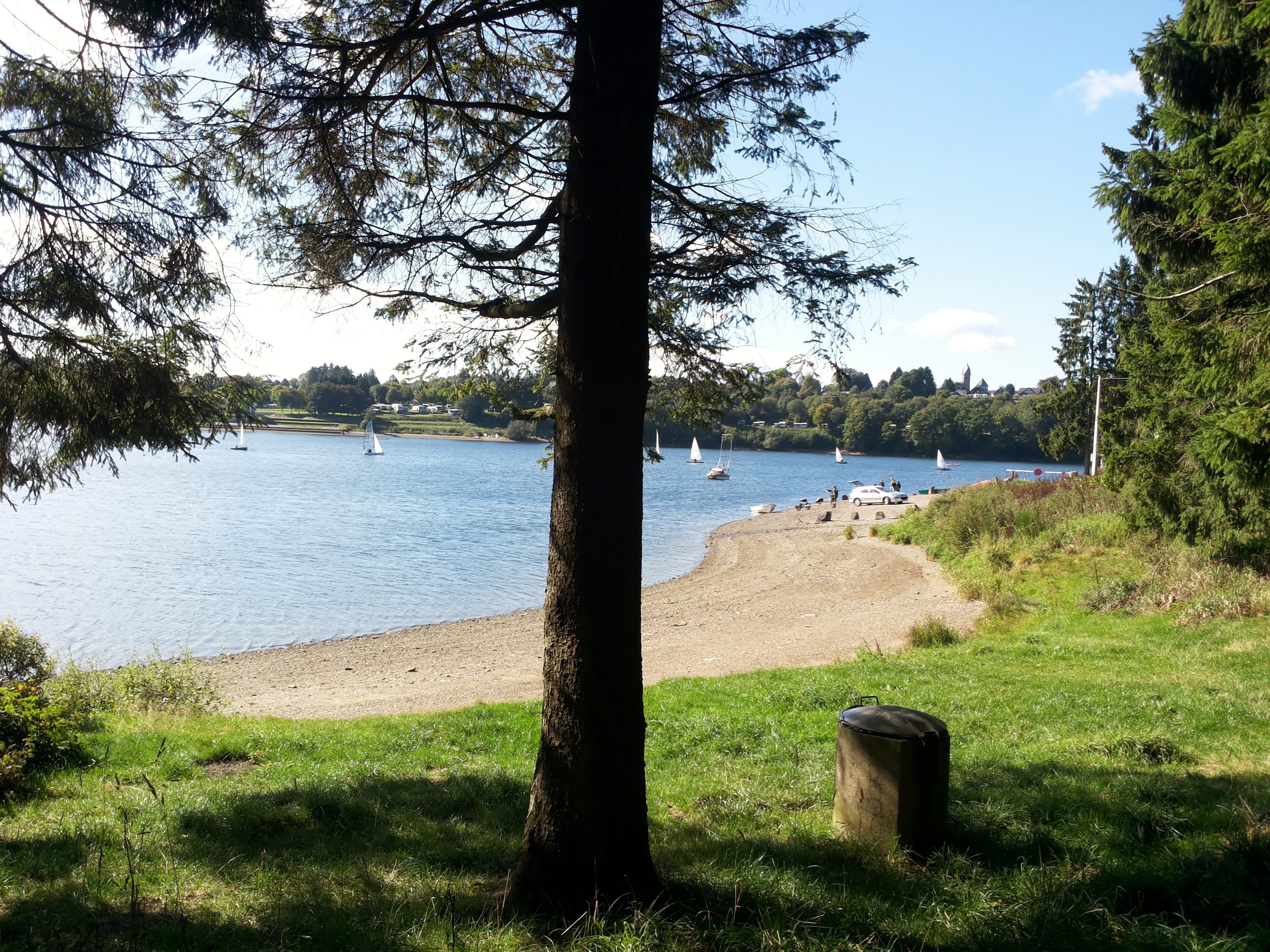 Stausee der Warche, Bütgenbach 2015, Belgien